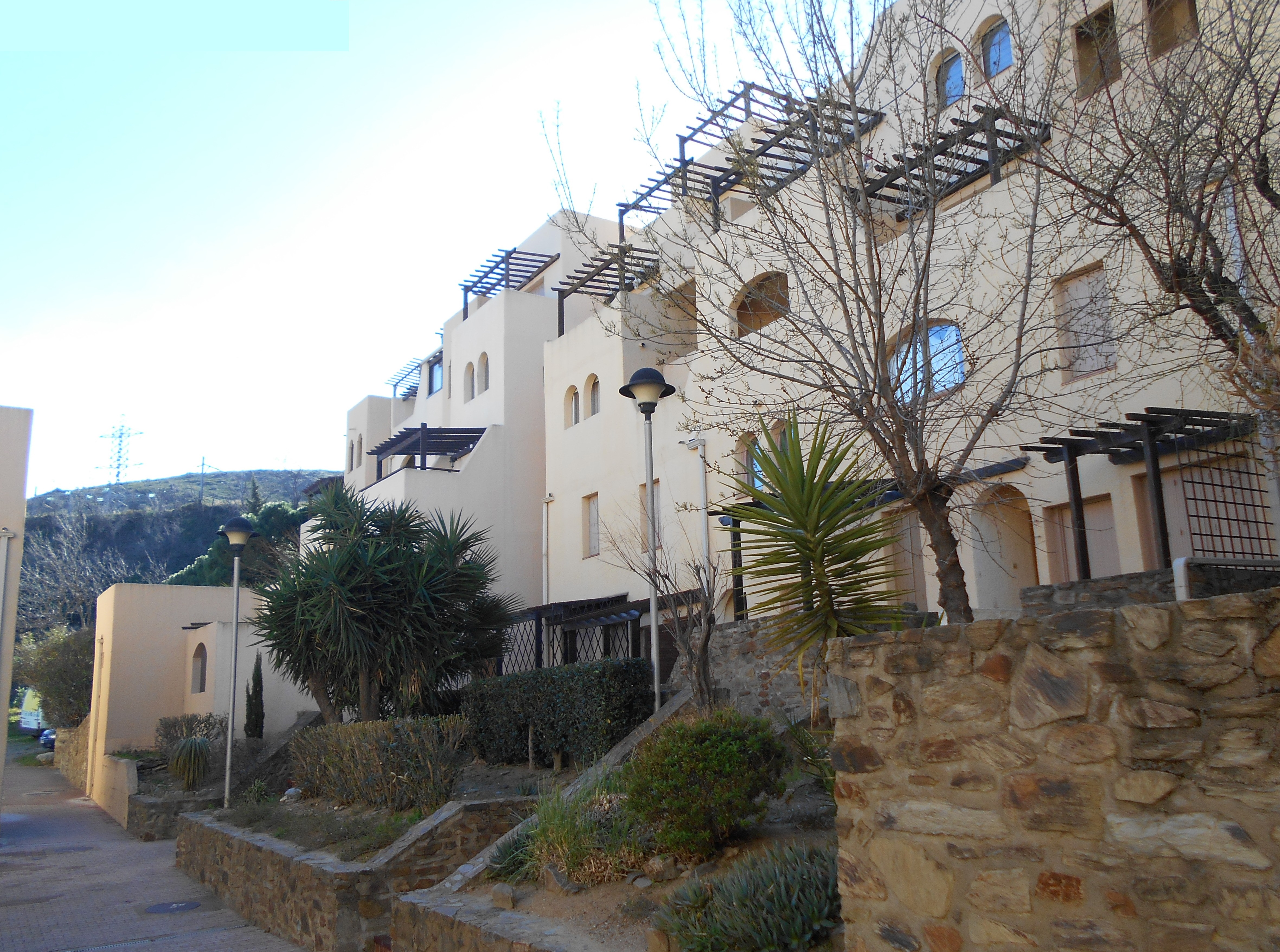 Petit nucli d'apartaments a Perafita, costat de Cervera de la Marenda